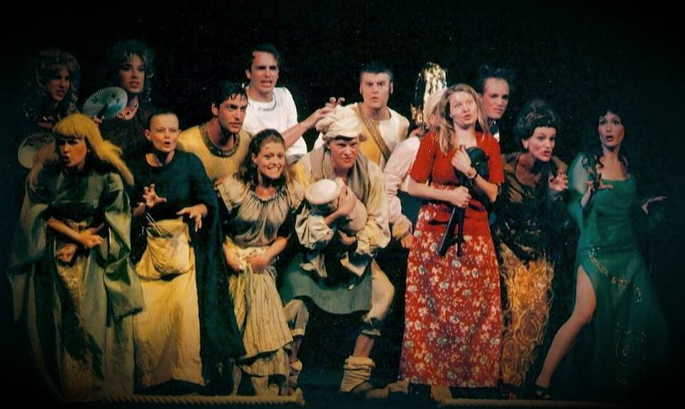 Stockholms Musikalkompanis produktion av Stephen Sondheims INTO THE WOODS på Södra Teatern i Stockholm 1998.